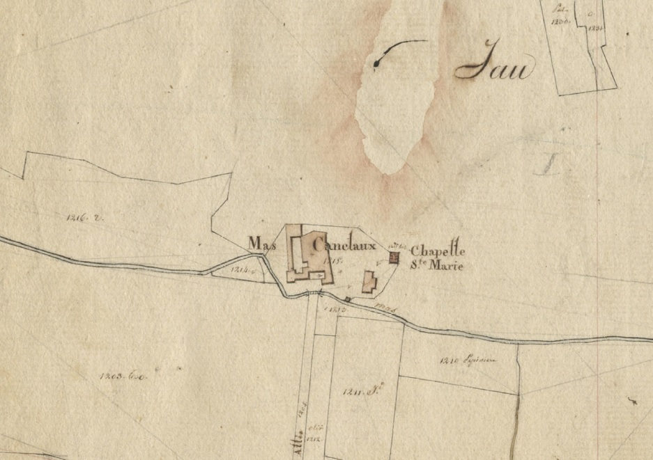 Imatge obtinguda dels mapes cadastrals dels Arxius Departamentals dels Pirineus Orientals, publicable si se'n cita l'origen